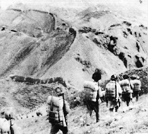 1949年3月，第20兵团跨越长城向太原进发